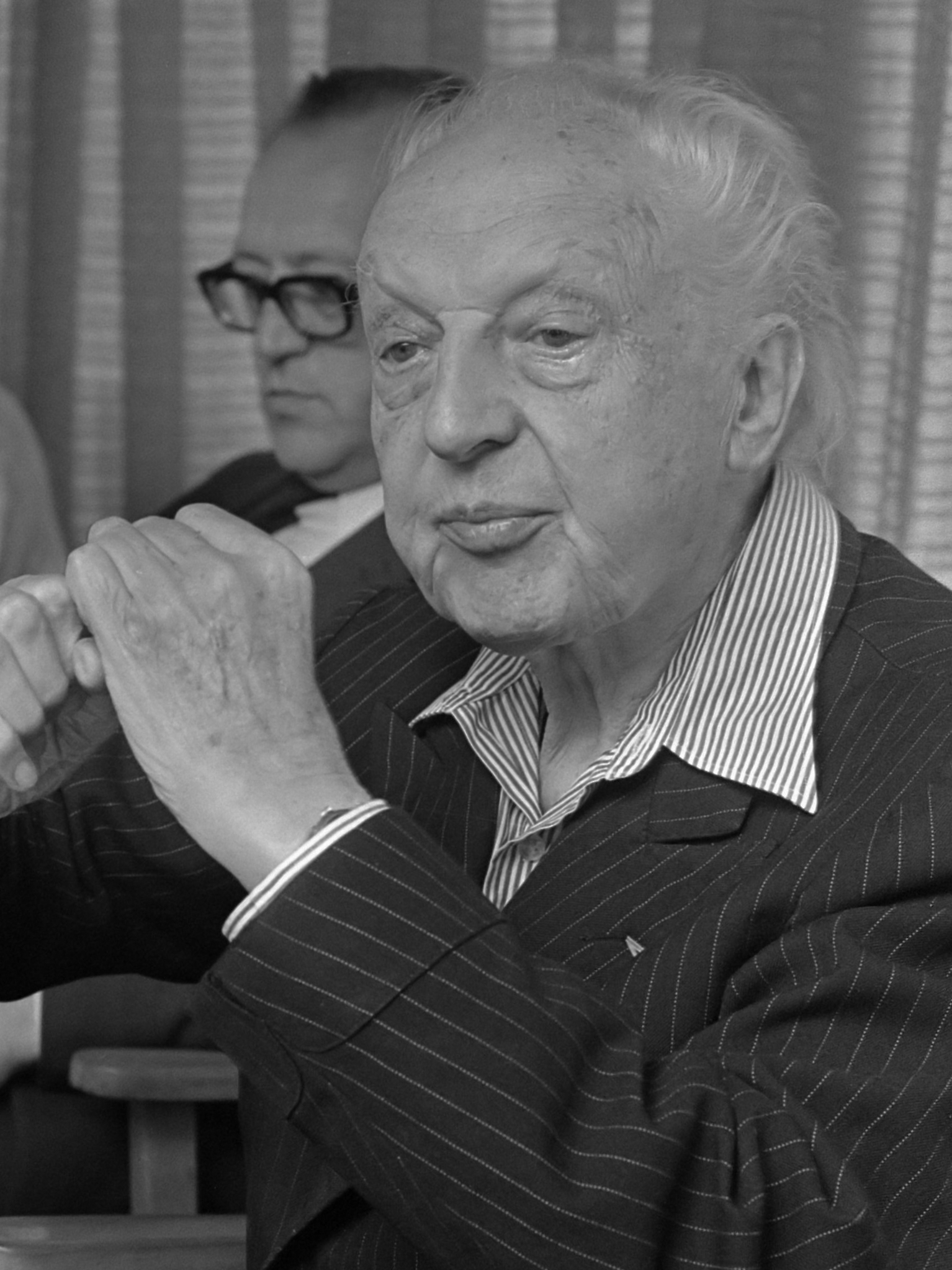 Leopold Stokowsky , 88 jaar , componist USA, houdt persconferentie te Hilversum, kop 11 augustus 1970